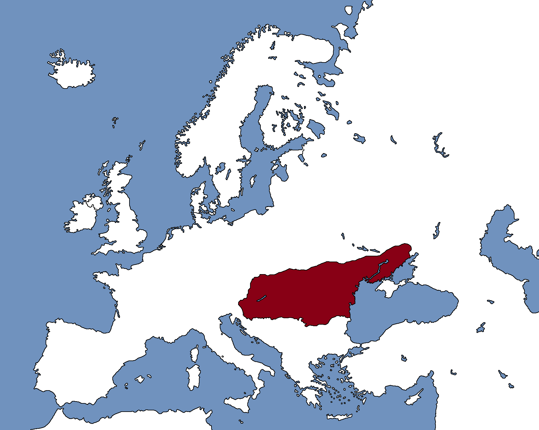 Avar Kağanlığının en geniş sınırları.